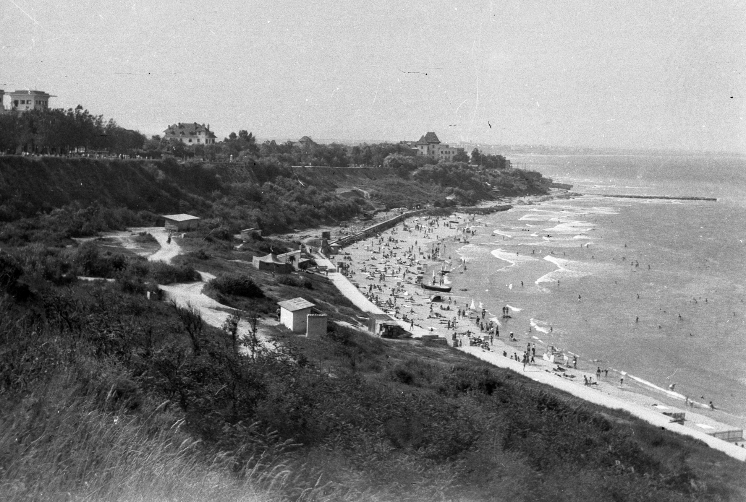 ekkor Vasile Roaită, Eforie Sud, strand. Location: Romania, Eforie Tags: sea shore, beach, picture Title: ekkor Vasile Roaită, Eforie Sud, strand.